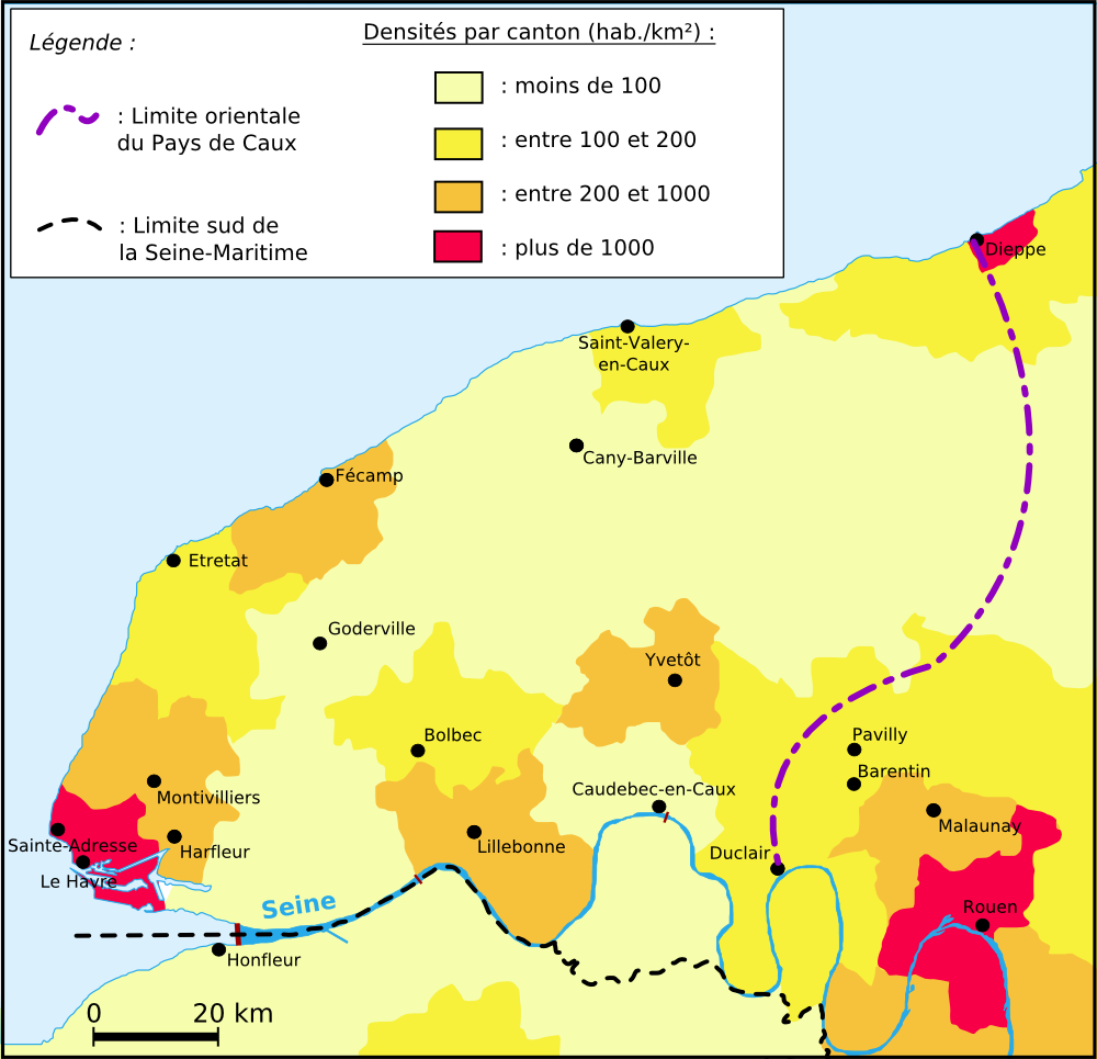 Carte du Pays de Caux, Seine-Maritime, France : densités